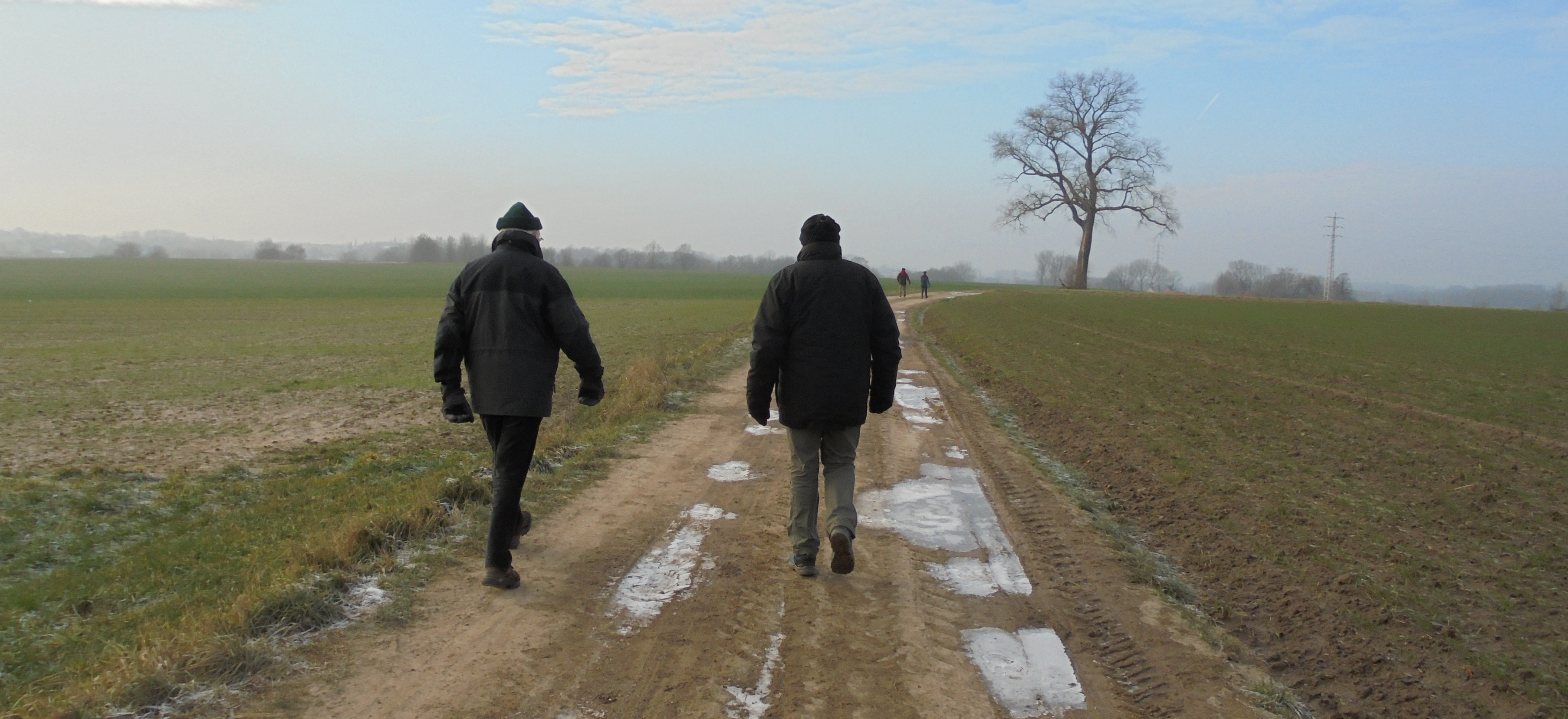 Populus x canadensis cv. 'Marilandica'- staat waar de Moeielos, de Vierschaar en de Vollander samenkomen - Strijpen - Zottegem - Oost-Vlaanderen - België.